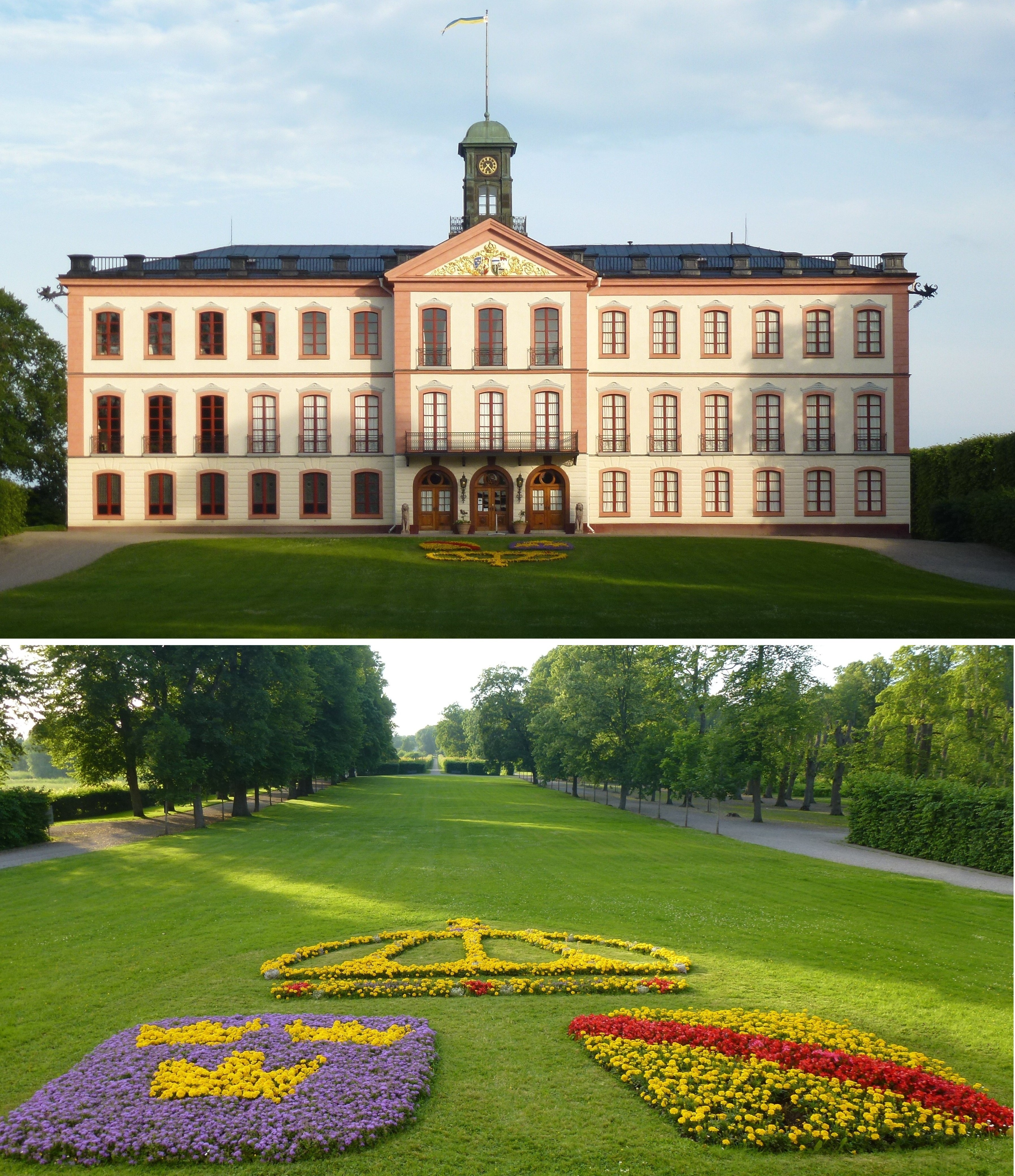 Tullgarns slott kollage, fasad och park